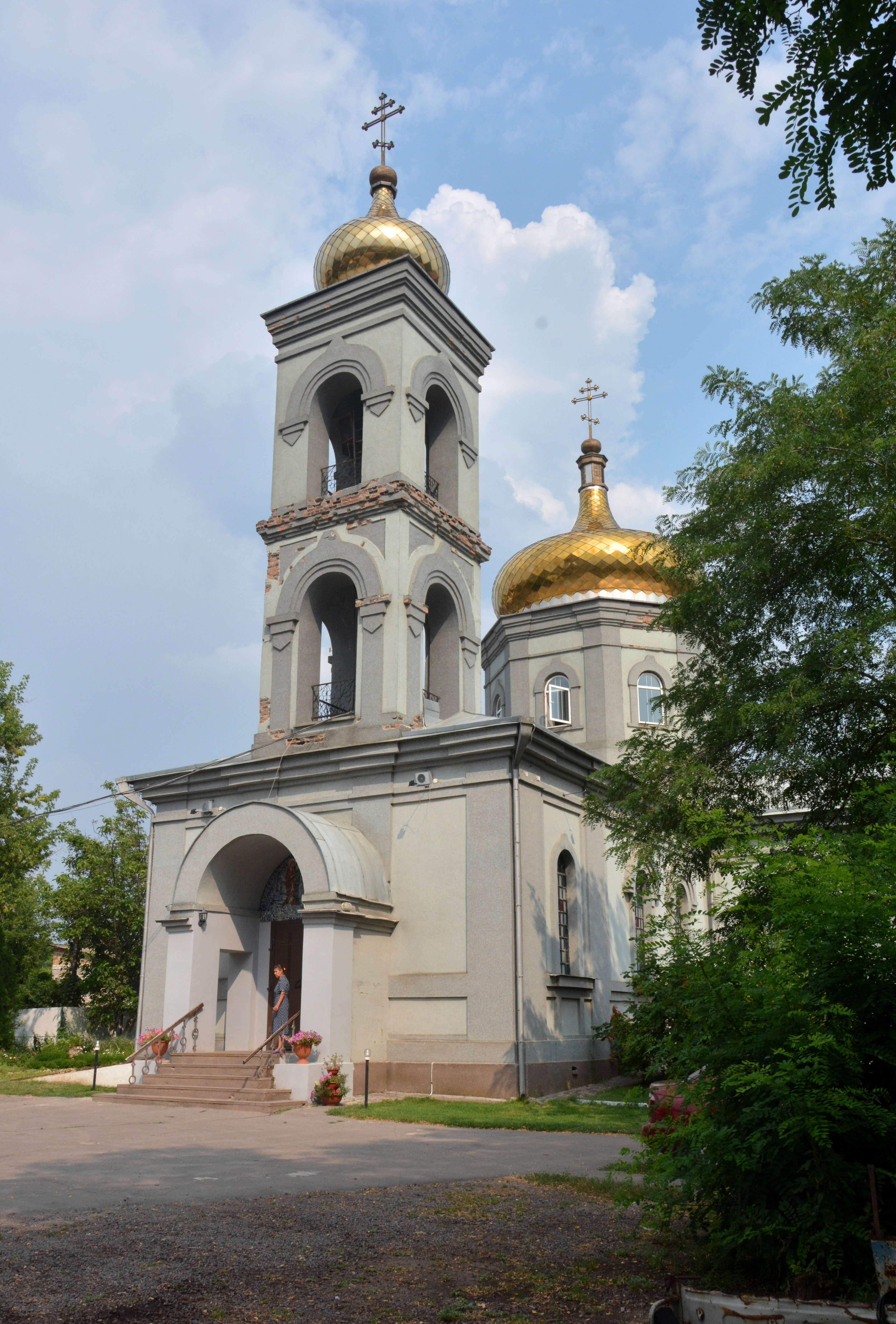 Стрітенська церква (мур.), Херсон, вул. Енгельса, 45